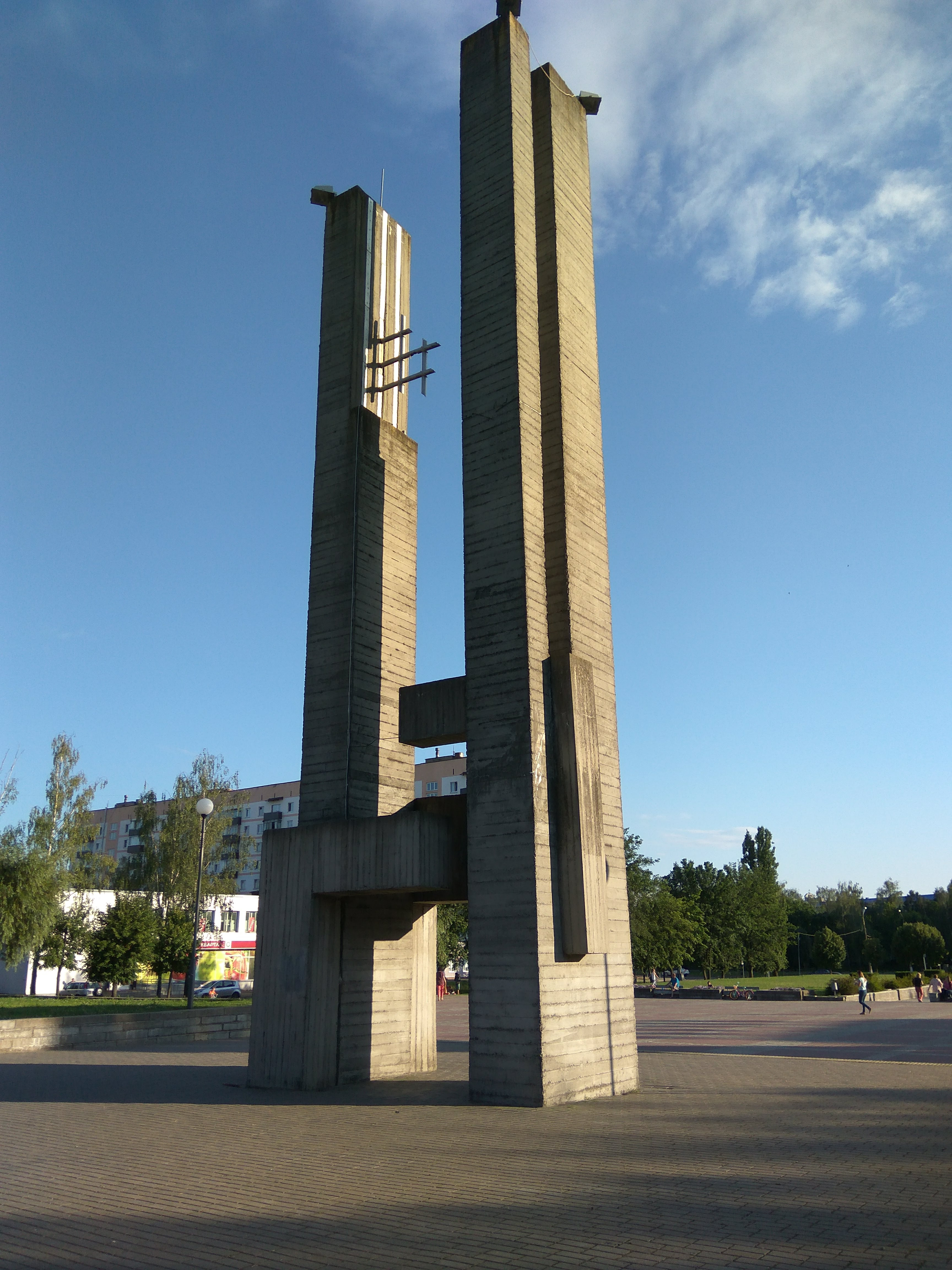 Магілёў. Мемарыяльны комплекс на месцы Лупалаўскага лагера